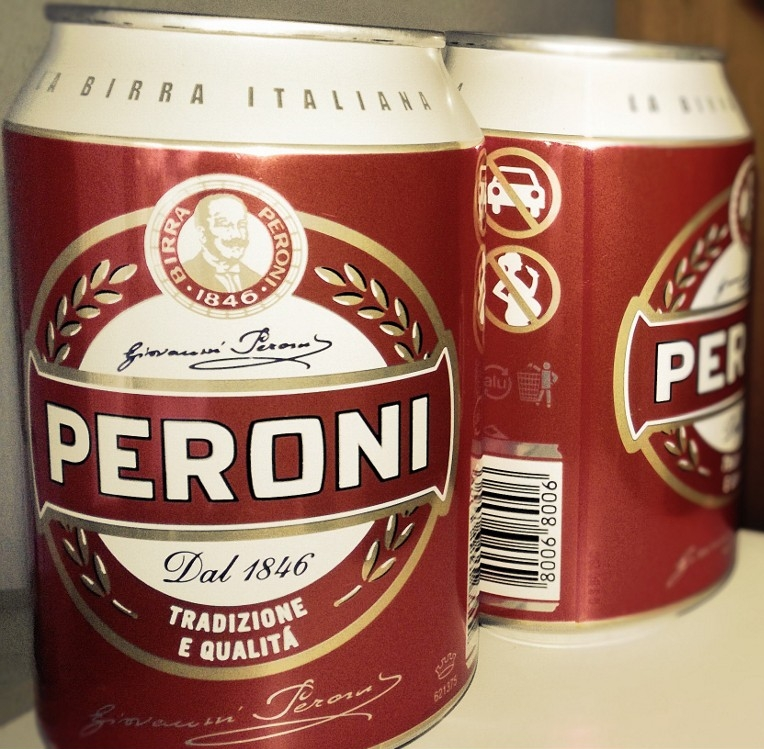 Foto zweier Peroni-Bierdosen.